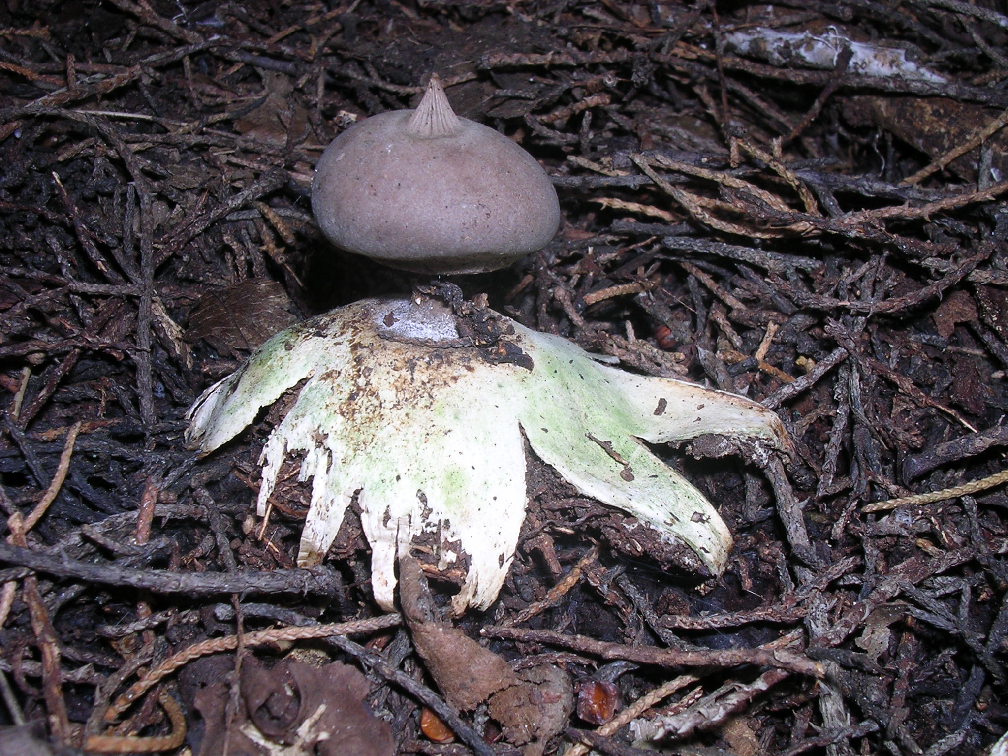 fungo geastrum (geaster) pectinatum